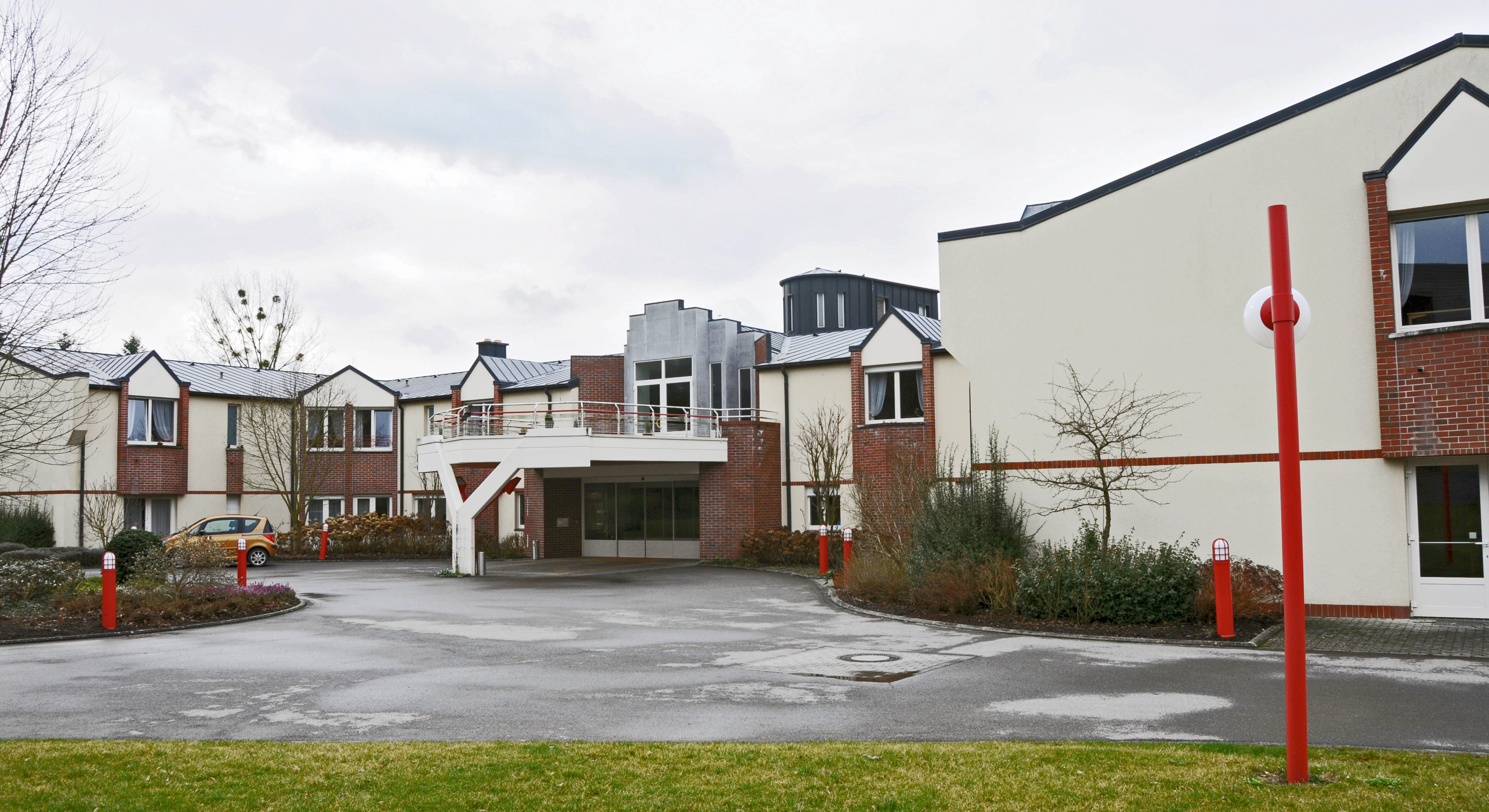 Park Heeschdref Tricentenaire.